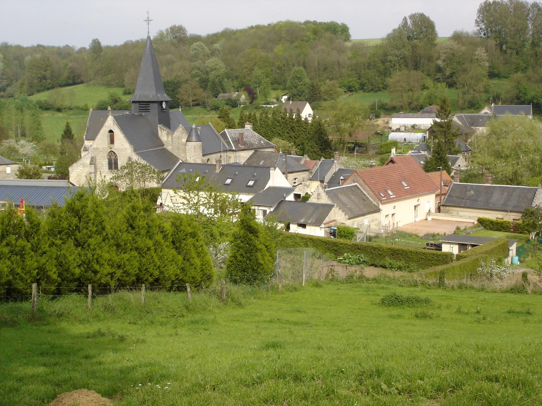 Selens (Aisne) - Vue générale